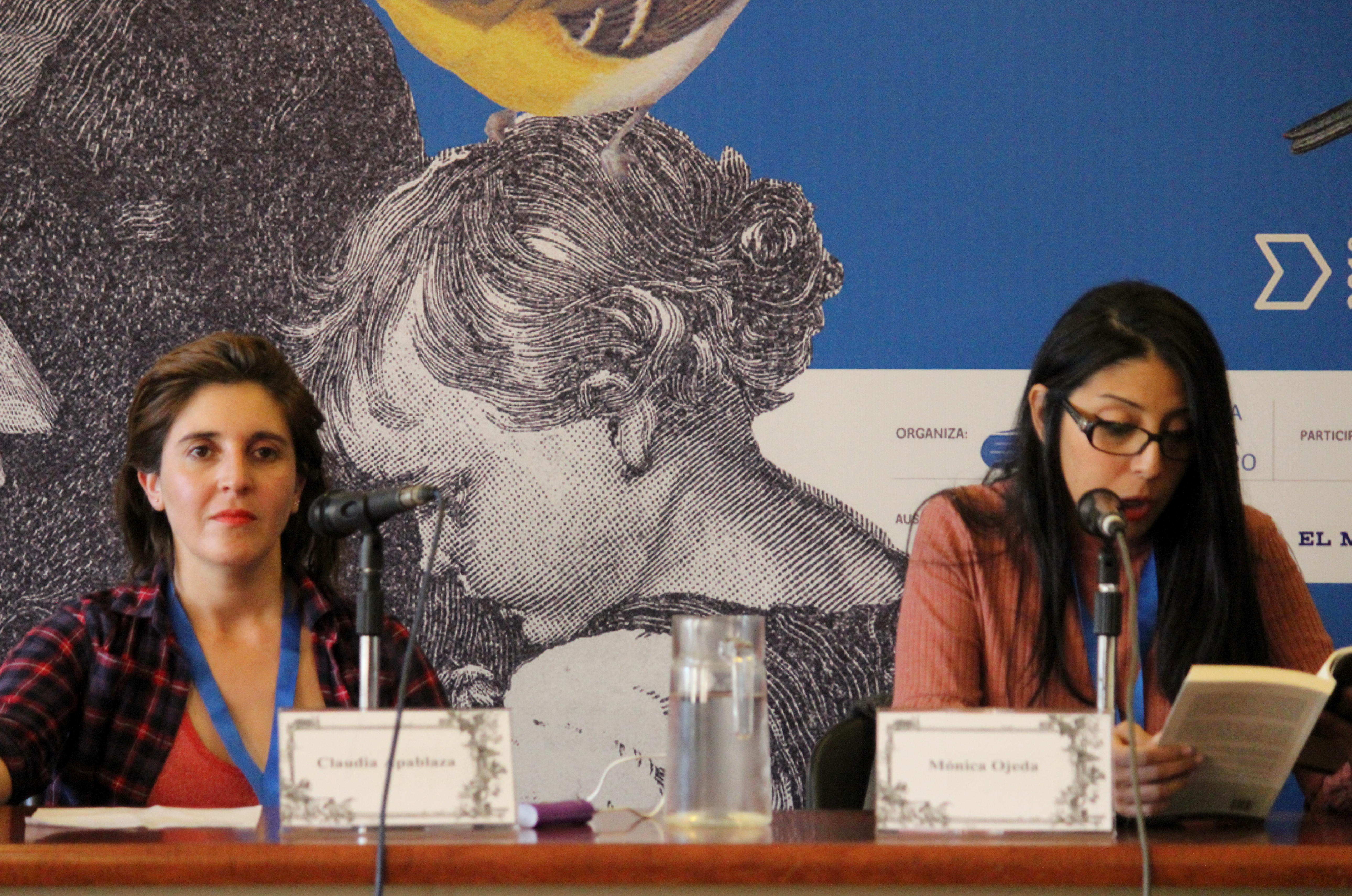 Las escritoras Claudia Apablaza (Chile) y Mónica Ojeda (Ecuador) en la Feria Internacional del Libro de Santiago 2018.